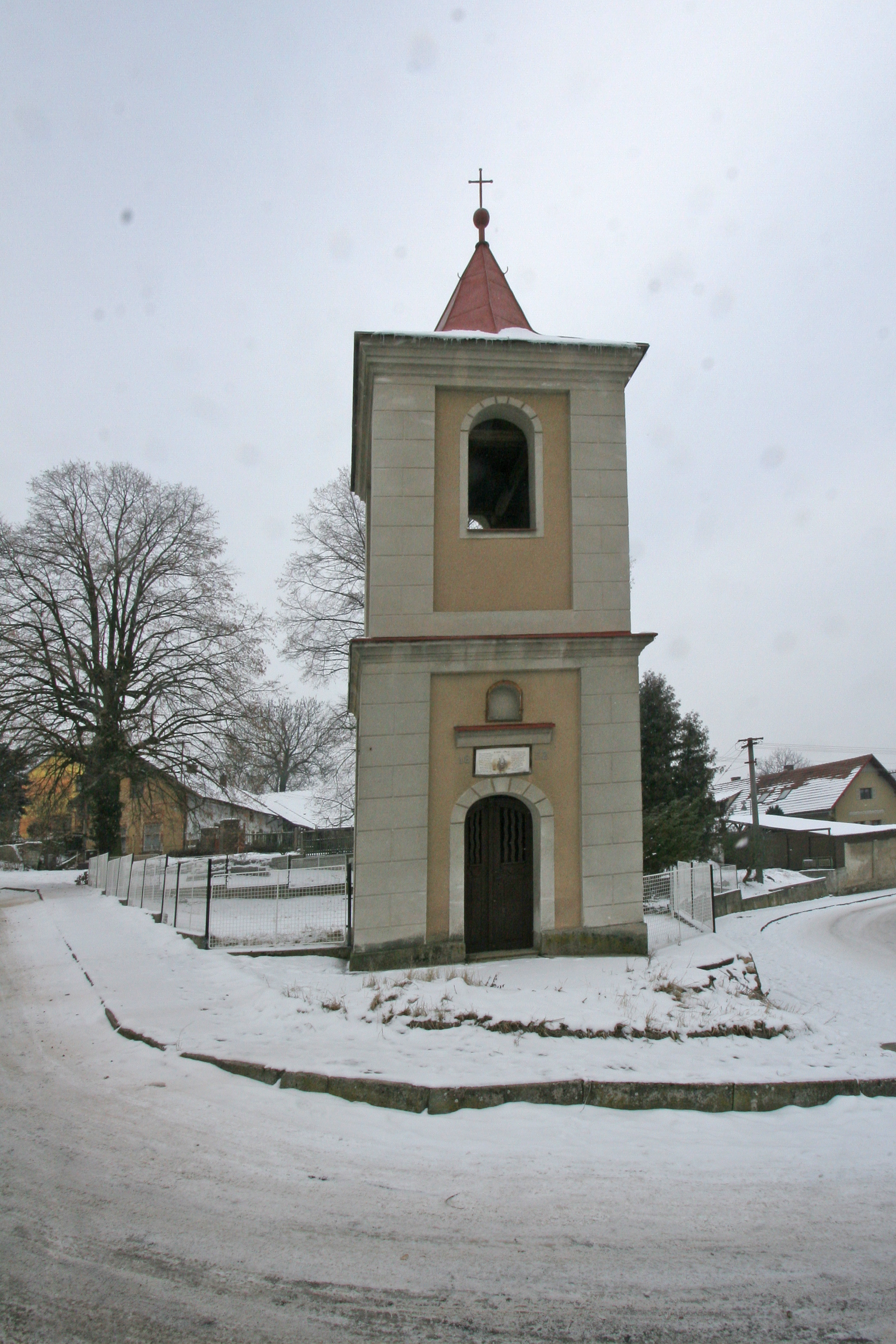 Opočno zvonička